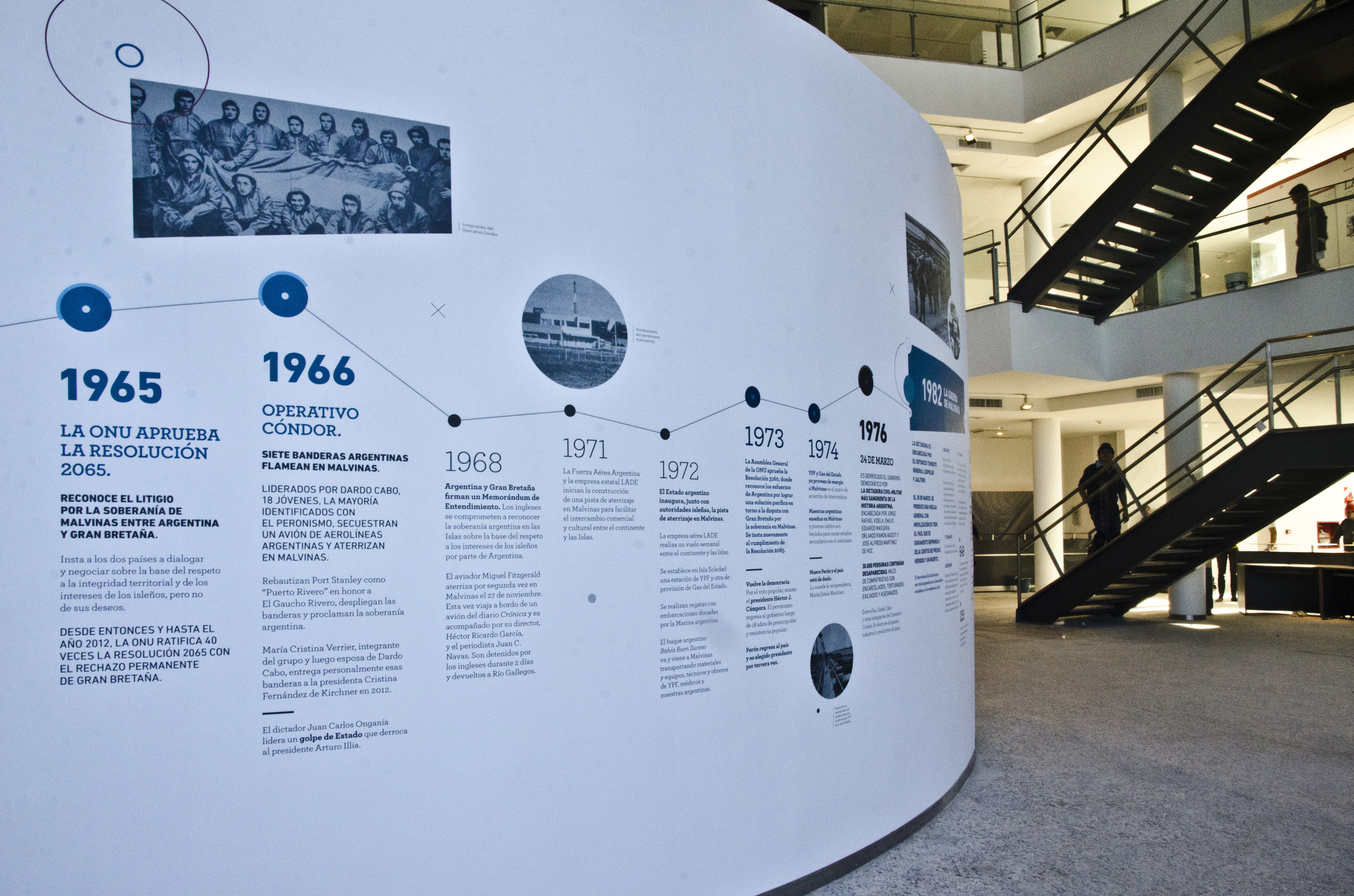 Museo Malvinas e Islas del Atlántico Sur Fotos: Romina Santarelli / Ministerio de Cultura de la Nación.